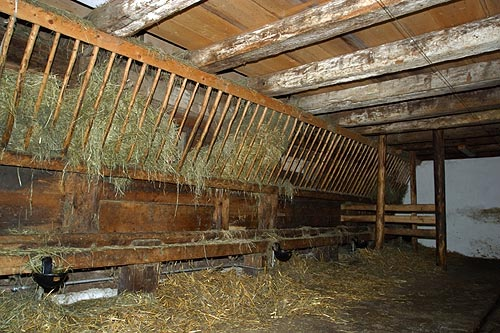 Freilichtmuseum Ballenberg